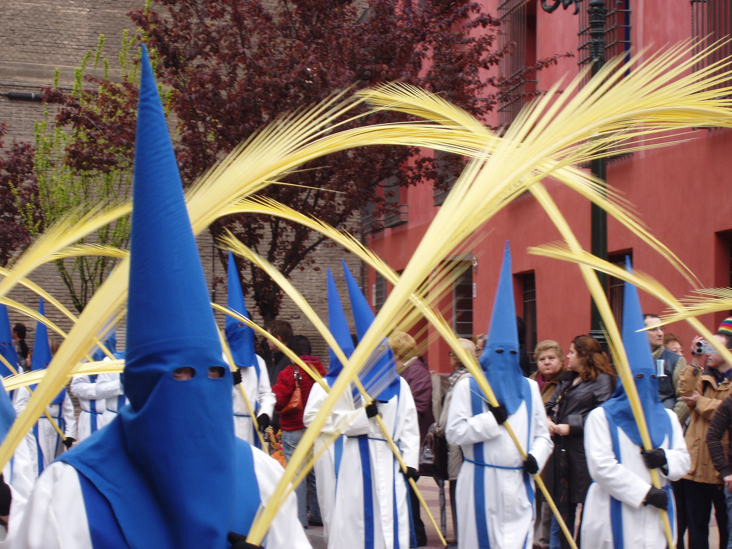 Domingo de Ramos, Cofradía de la Entrada (Zaragoza))